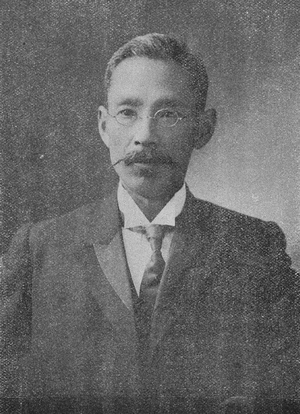 Portrait of Katsura Hidema (桂秀馬, 1861 – 1911)